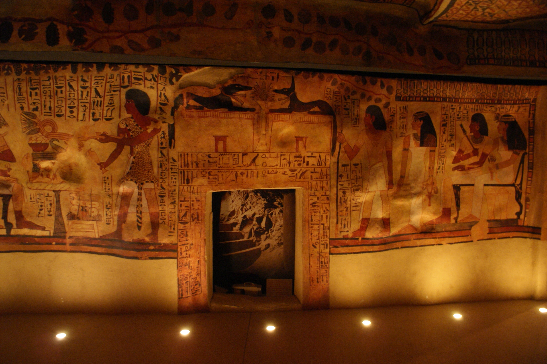 Salle égyptienne du Musée de Tessé au Mans